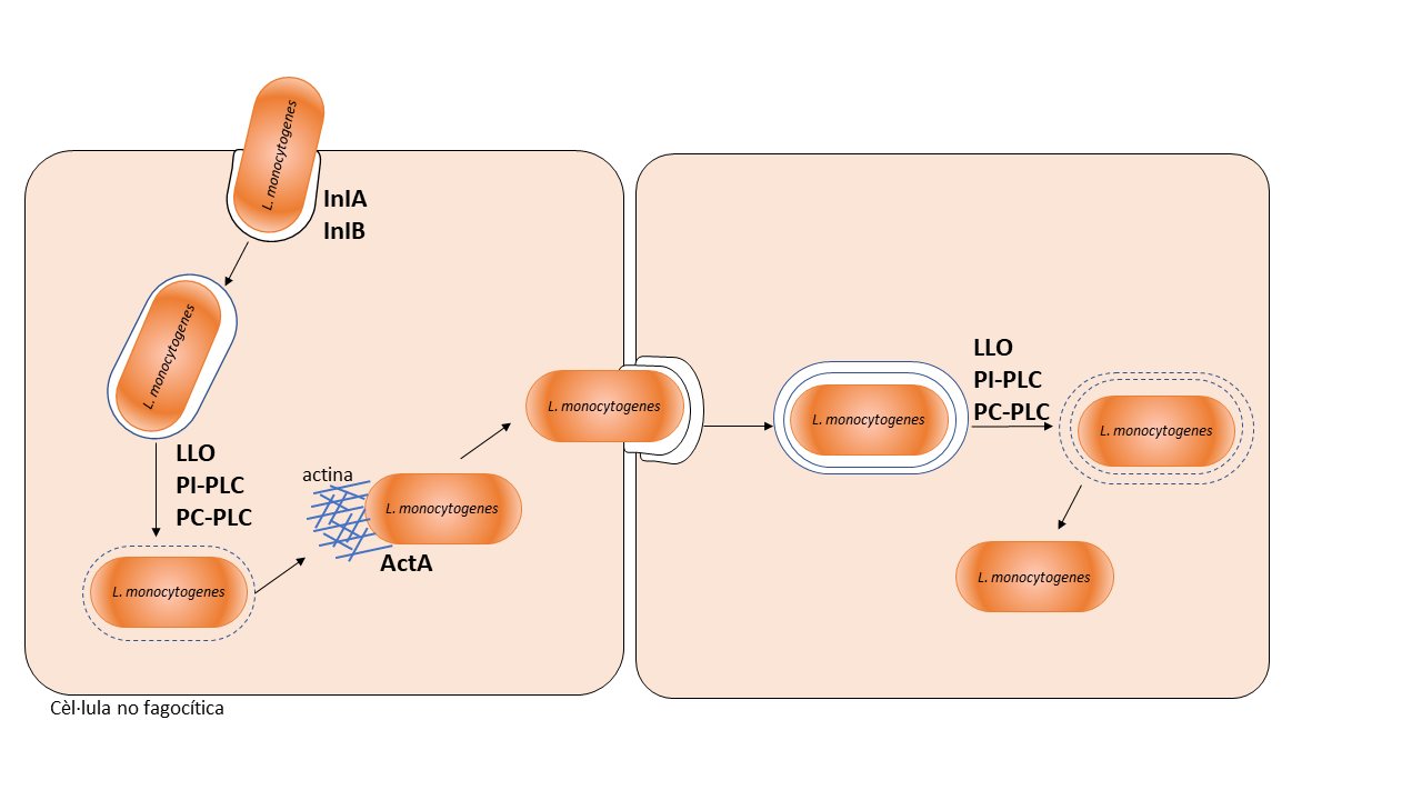 Representa com Listeria monocytogenes pot entrar a diferents cèl·lules no fagocítiques i els gens principals involucrats en aquest procés.